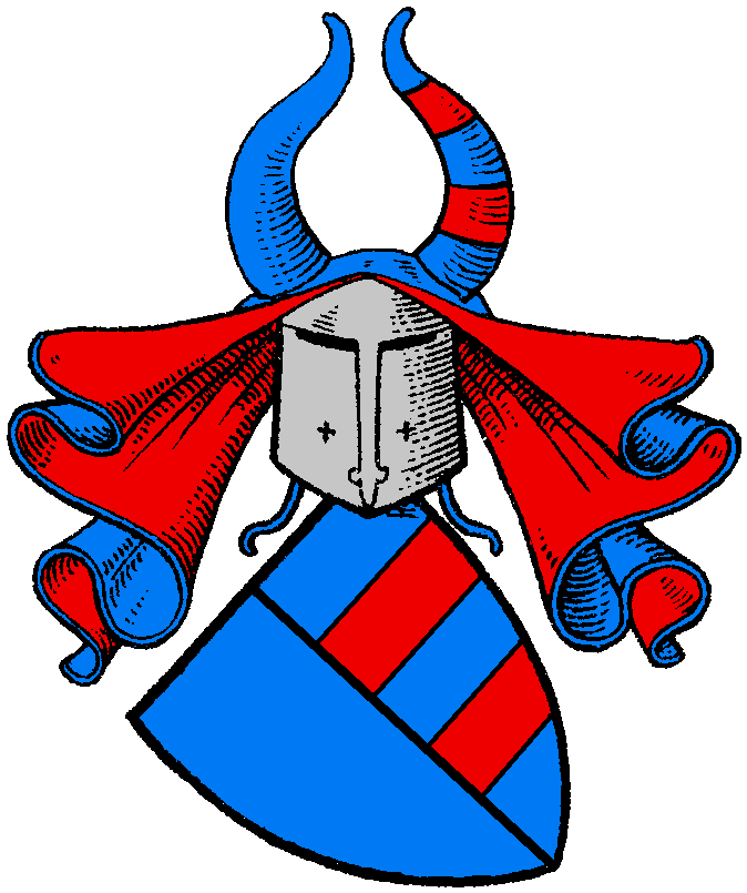 Stammwappen der sächsischen altadligen (von) Preuß (im 13./14. Jahrhundert noch „de Pruz“ geschrieben).